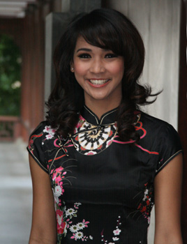 Miss Indonesia 2007 Kamidia Radisti. Photo taken in Miss World, Sanya 1/12/07.